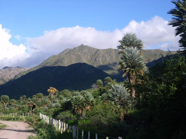 Cerro Negro con Palmeras. Sierras Pampeanas, Papagayos, San Luis.